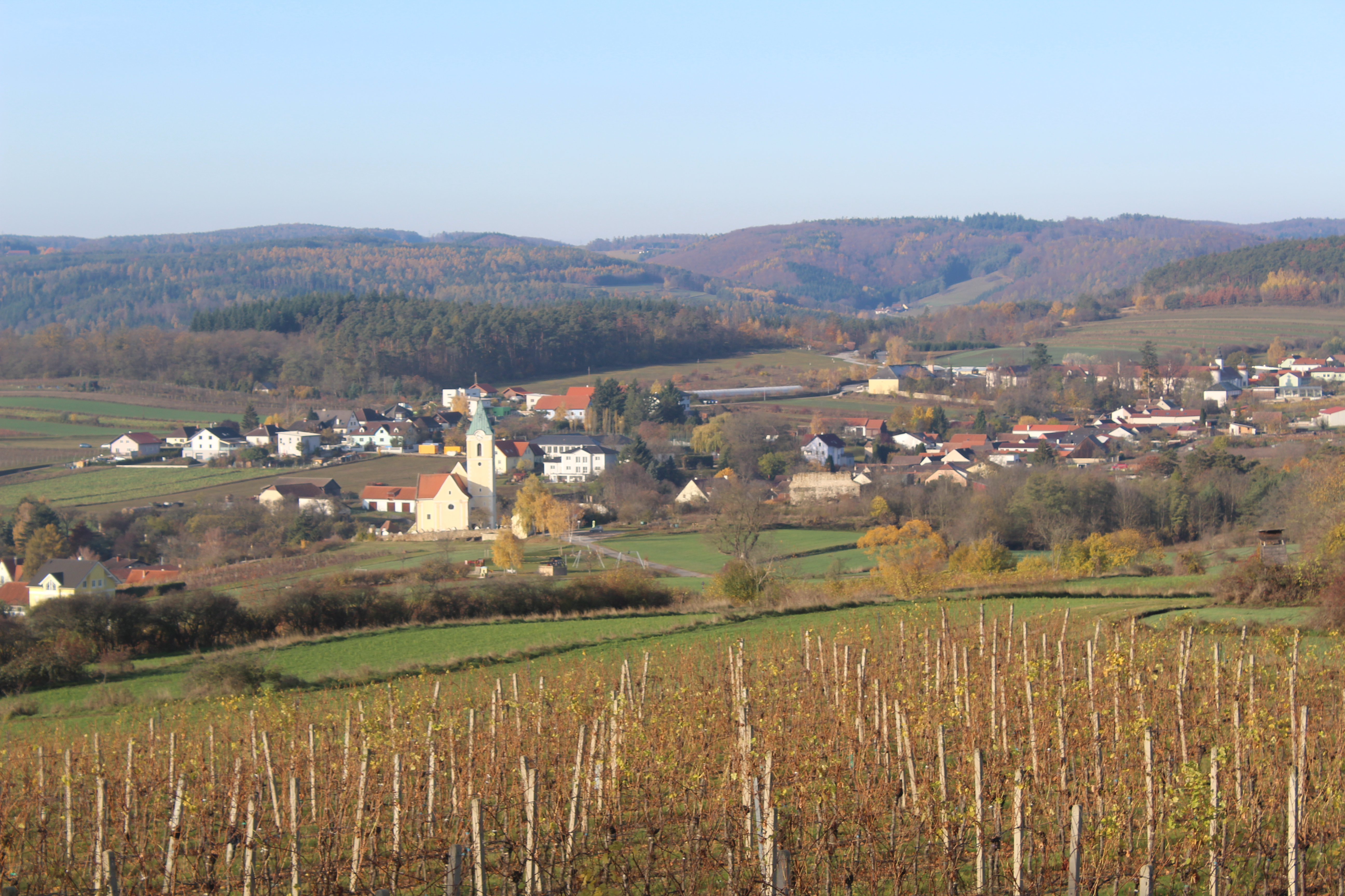 Blick über Schiltern mit Pfarrkirche und Zorimauer. Das Straßendorf liegt teilweise im Bild nicht sichtbar unterhalb der Kirche.